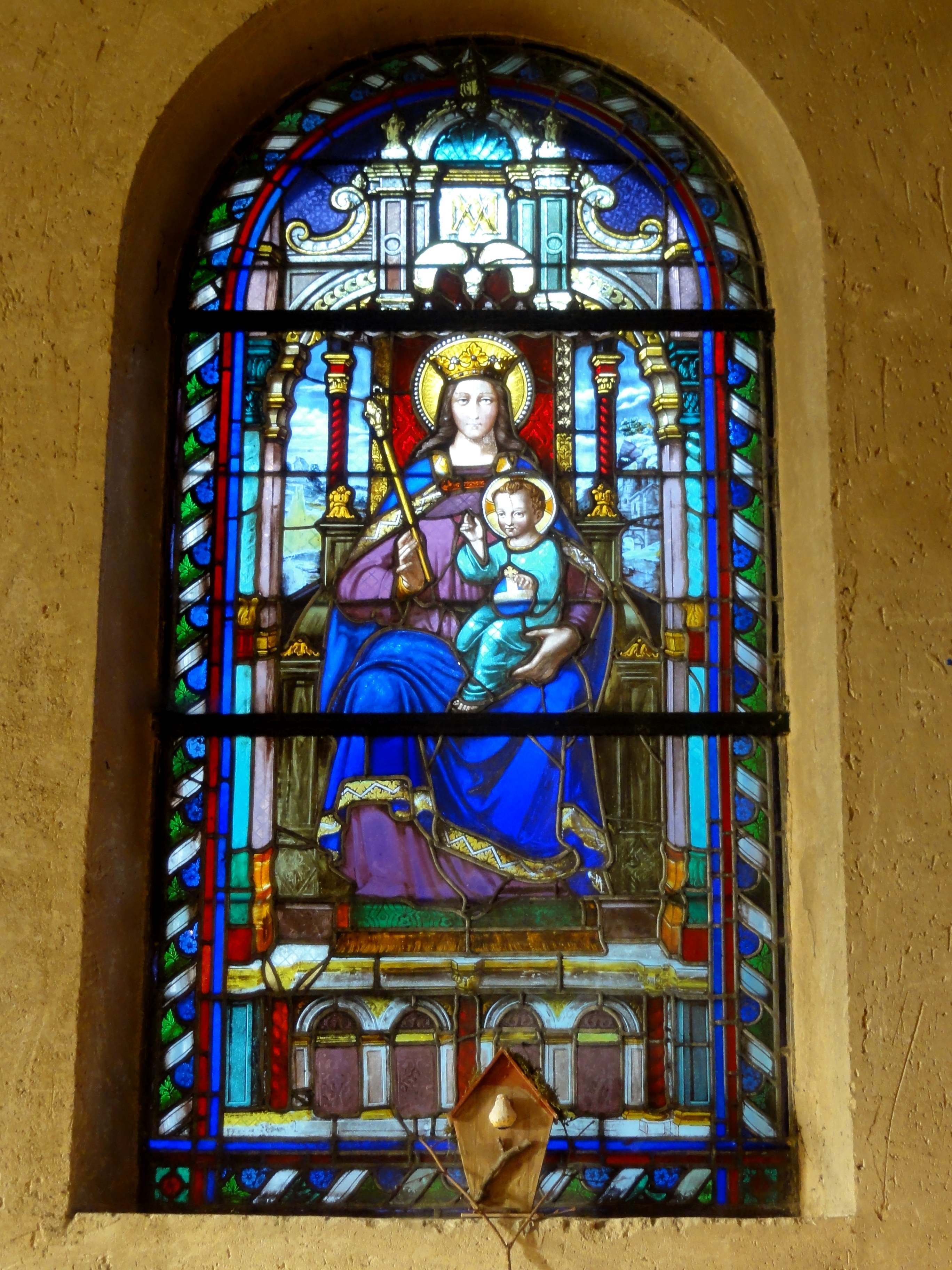 Vitrail de la Vierge à l'Enfant.